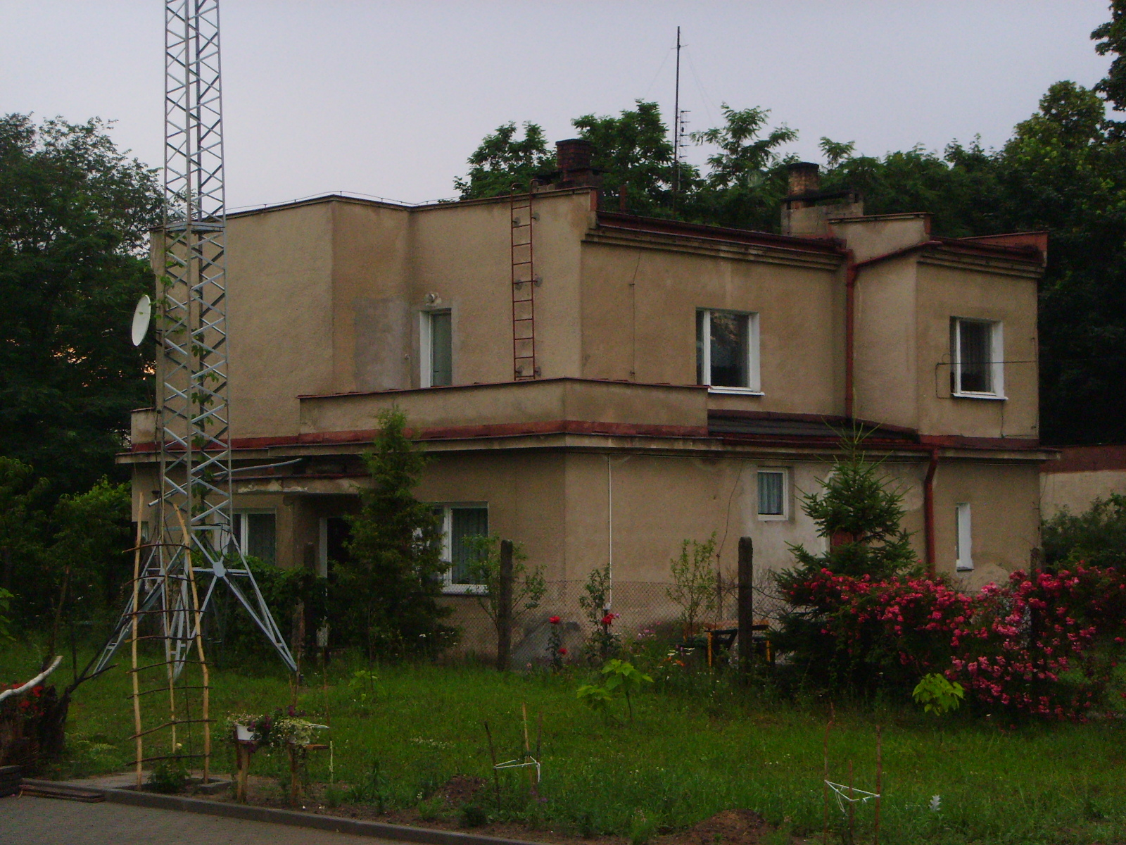 Była strażnica WOP w Gubinie